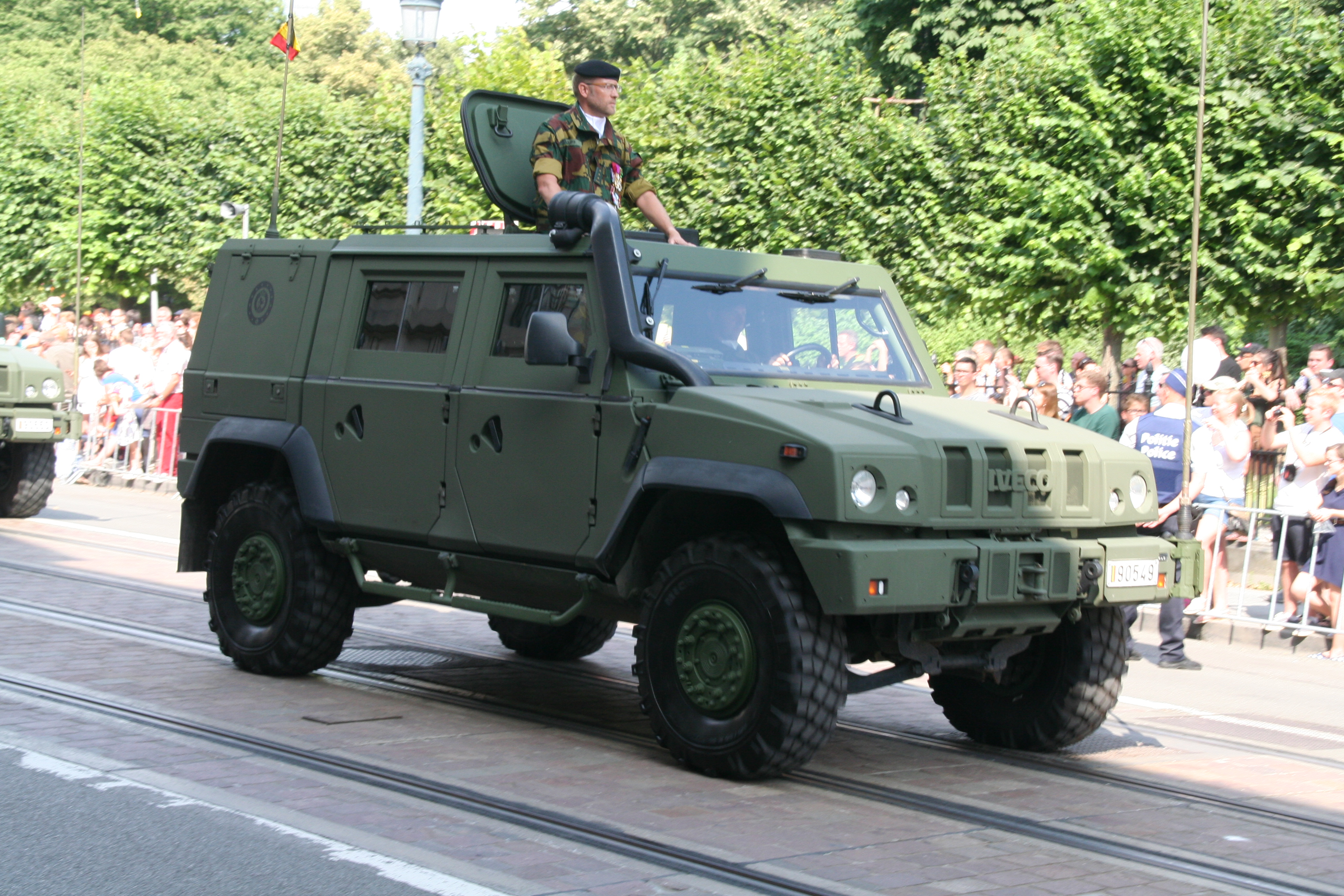 Fête nationale belge à Bruxelles le 21 juillet 2016 - Armée belge (Défense)